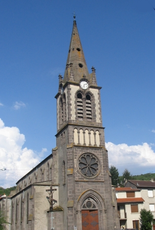 L'église de Nohanent (63).